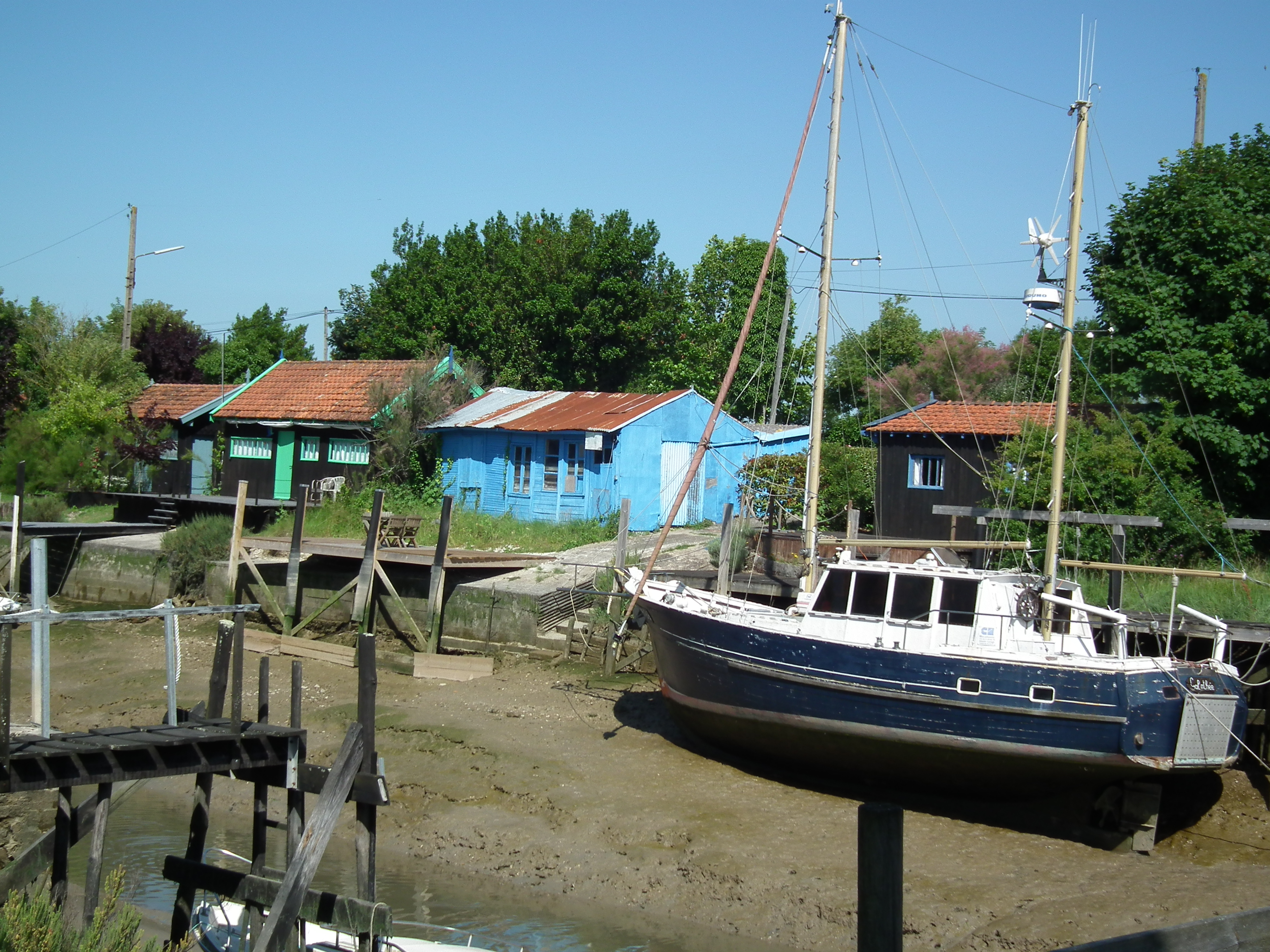 Le port ostréicole de La Tremblade